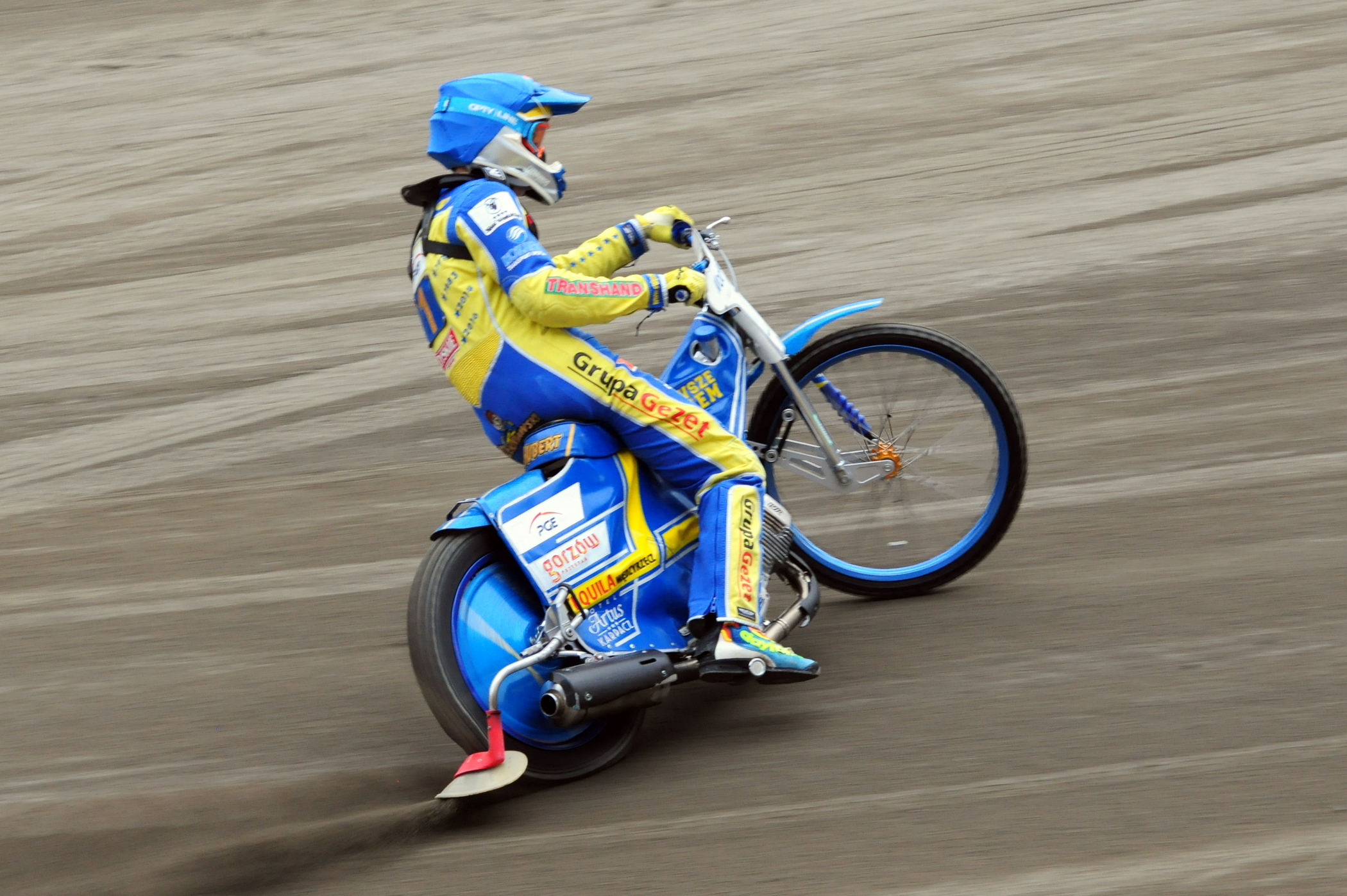 Hubert Czerniawski (Stal Gorzów)